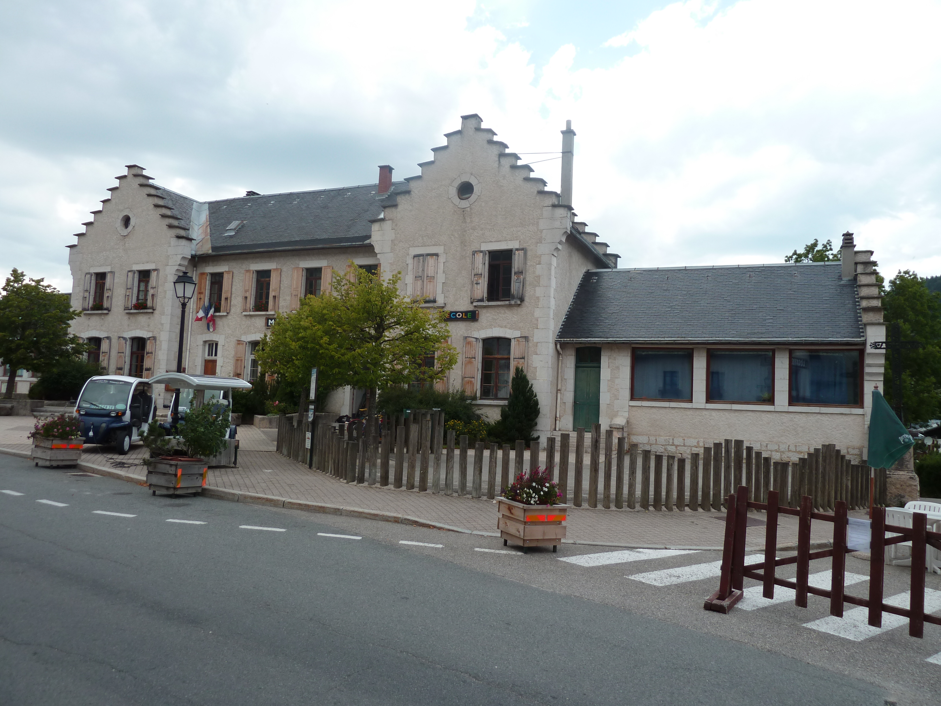 Corrençon-en-Vercors (38) : L'école.